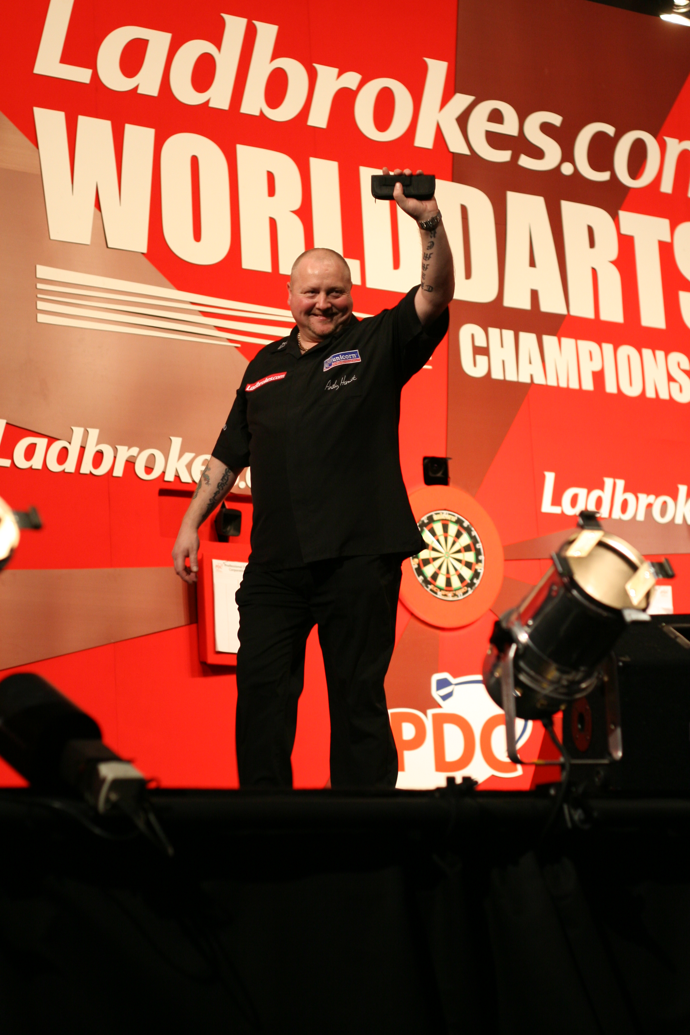 Andy Hamilton